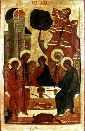 Икона Троица Ветхозаветная. II пол. XVI в. Из собрания Серпуховского историко-художественного музея. Holy Trinity icon from museum of Serpukhov